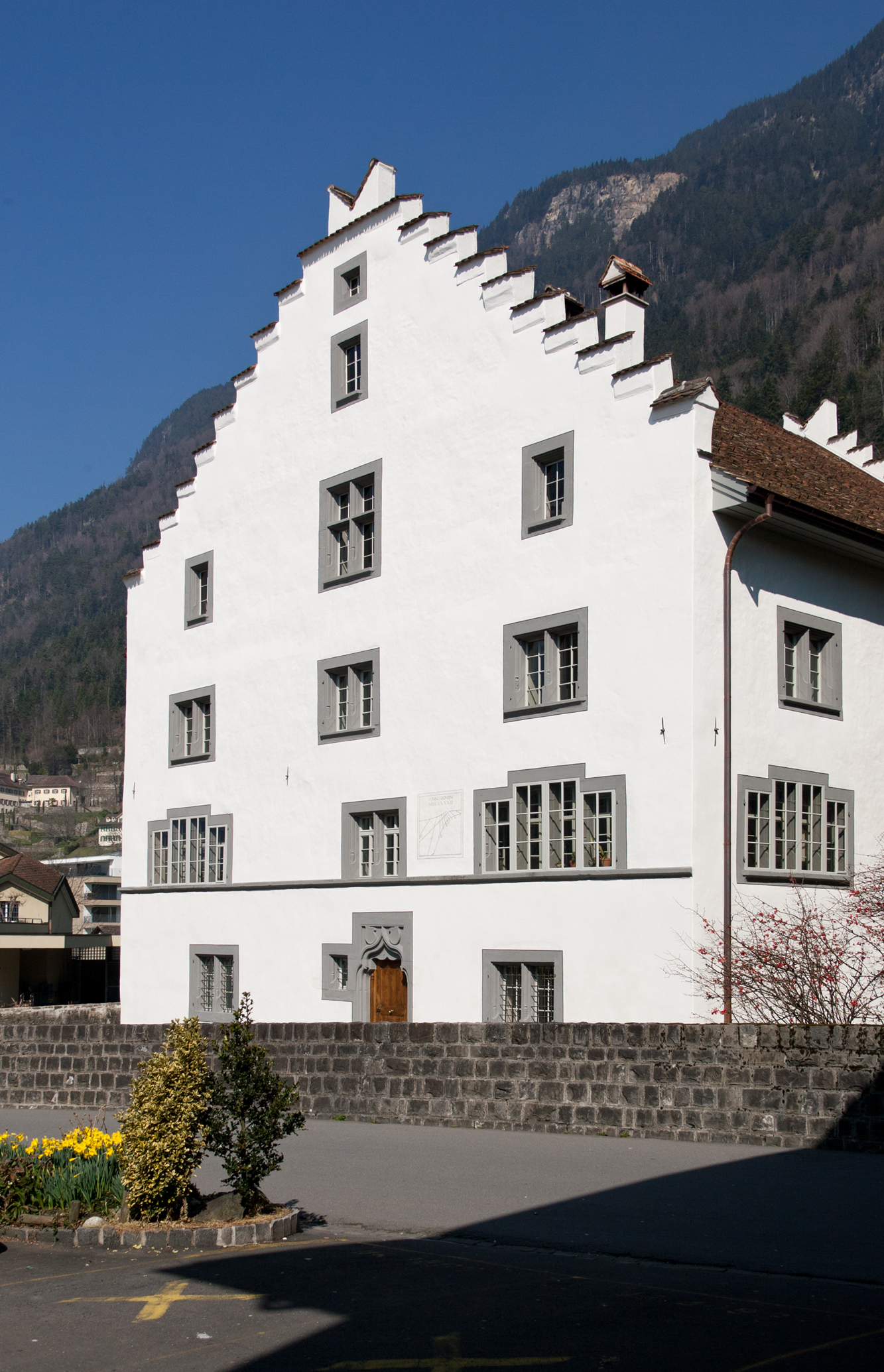 Das ehemalige Haus Jauch, heute Suworow-Haus, in Altdorf